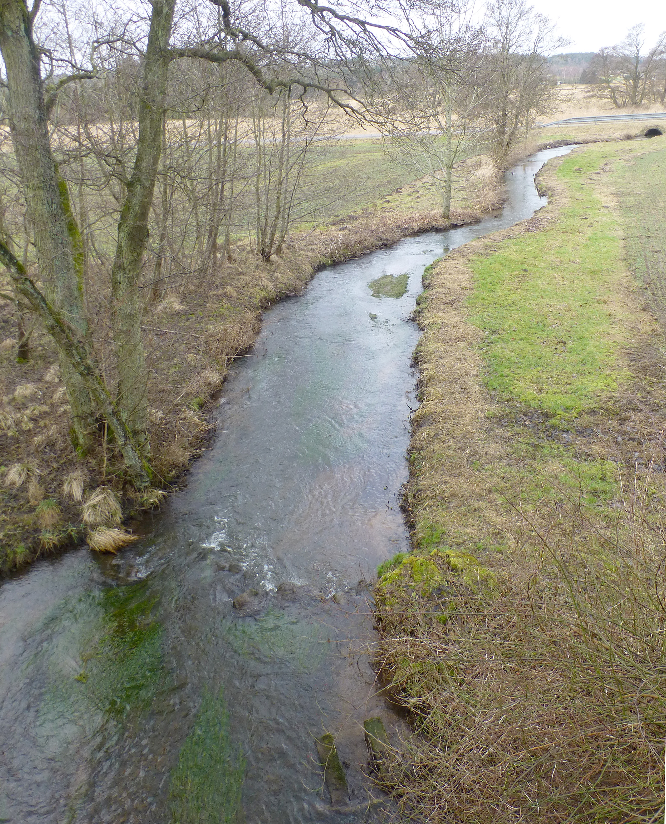 Linå set fra den nedlagte jernbane nordøst for Resenbro